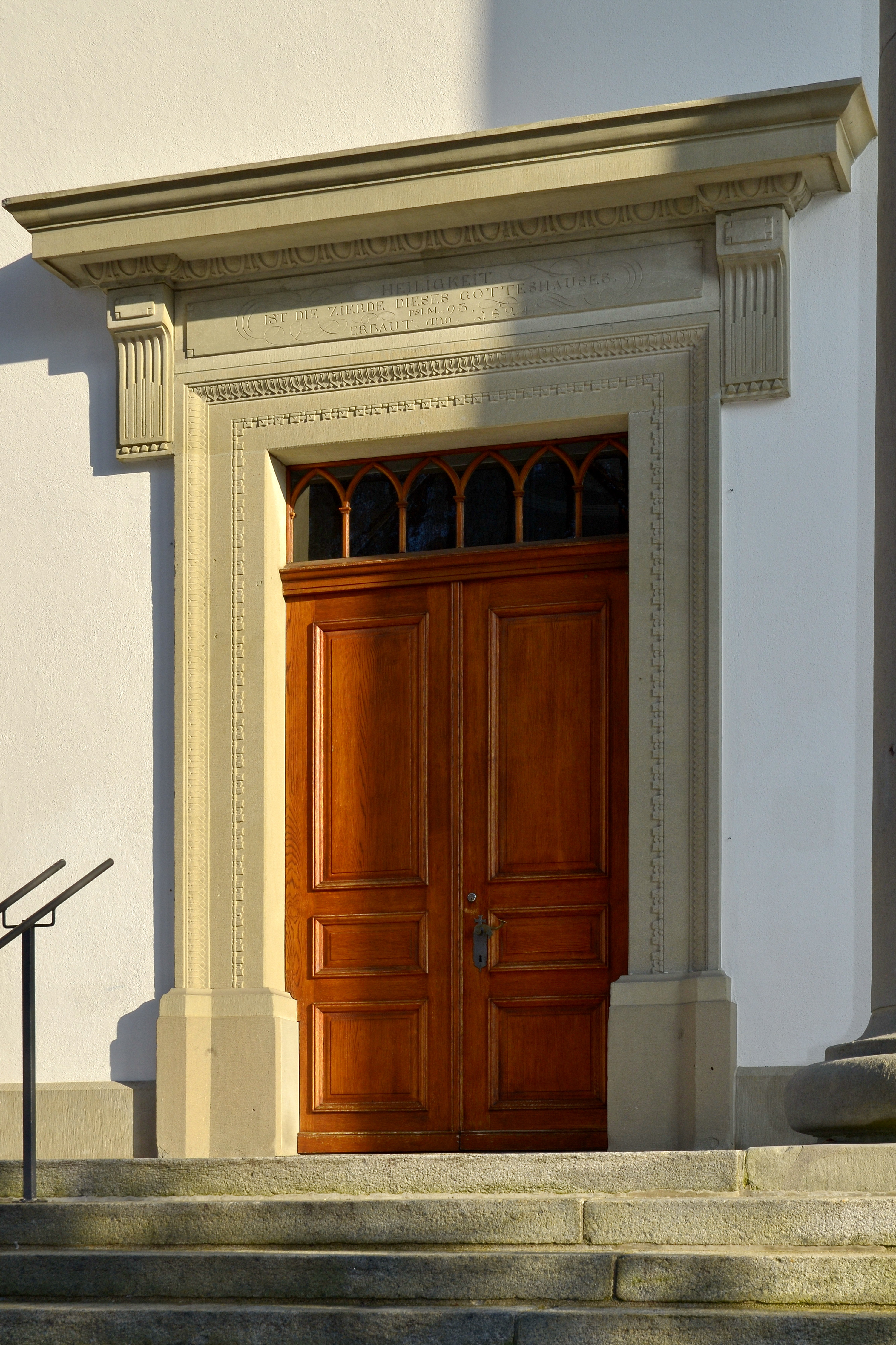 Reformierte Kirche in Uster